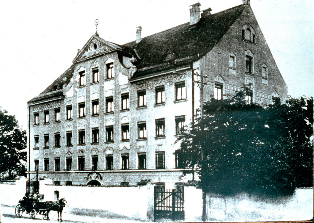 Das Käß-Palais, ehemals auch das Haunstetter Rathaus, noch mit der Einfriedungsmauer. Bild: Sammlung Wahl